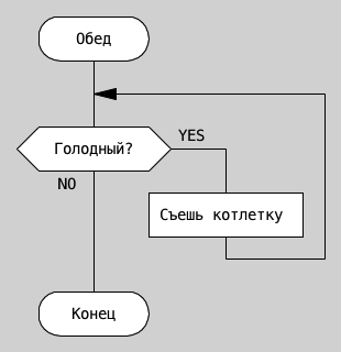 ДРАКОН-схема обеда.